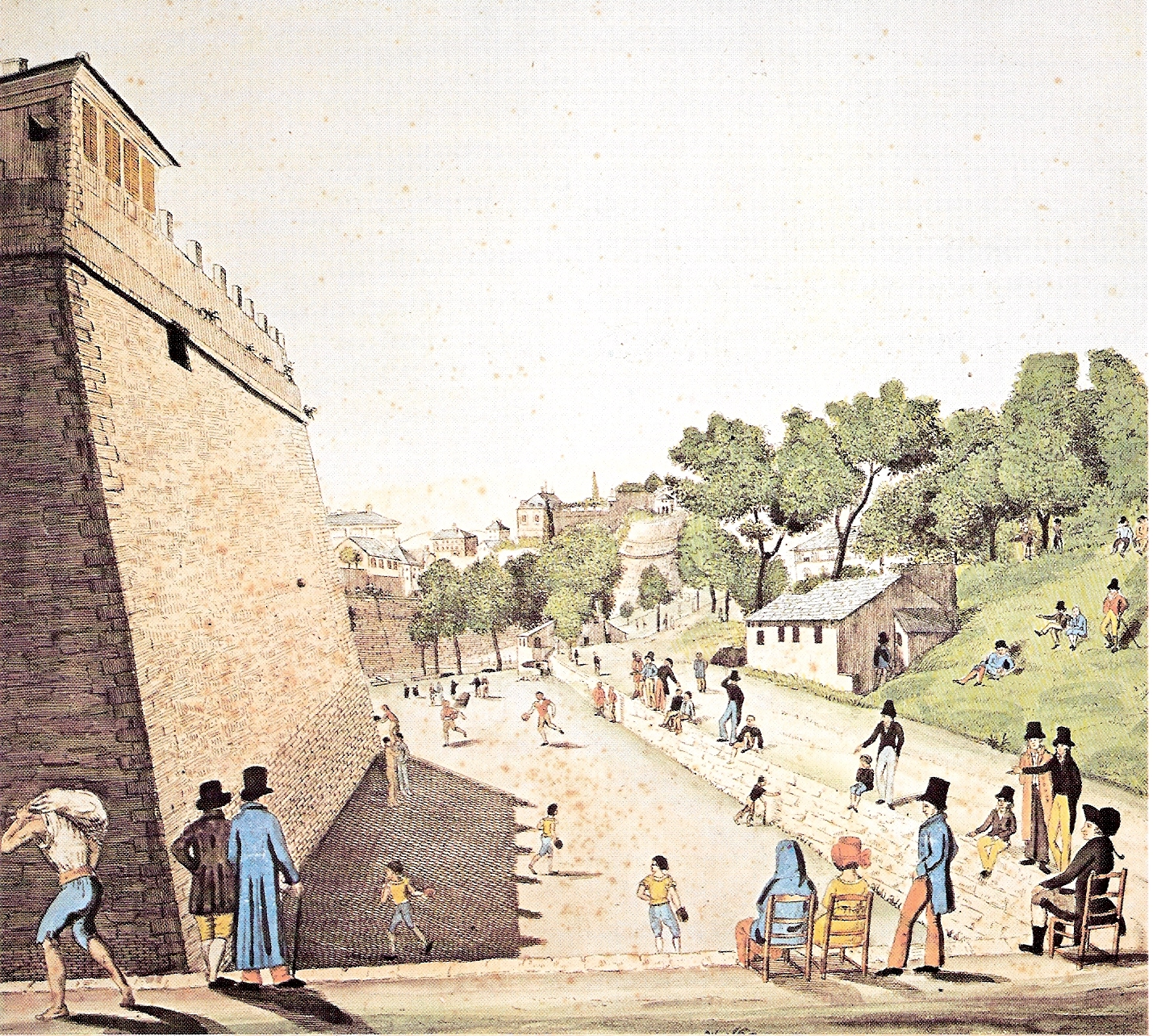 Dipinto raffigurante nel XIX secolo il gioco del pallone presso la zona dell'Acquasola